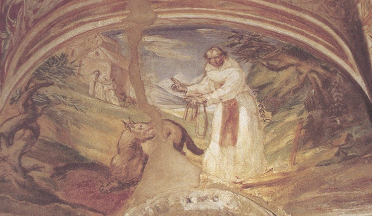 Sant'Amico di Rambona, in un affresco della cripta dell'Abbazia di Rambona mentre ammansisce il lupo